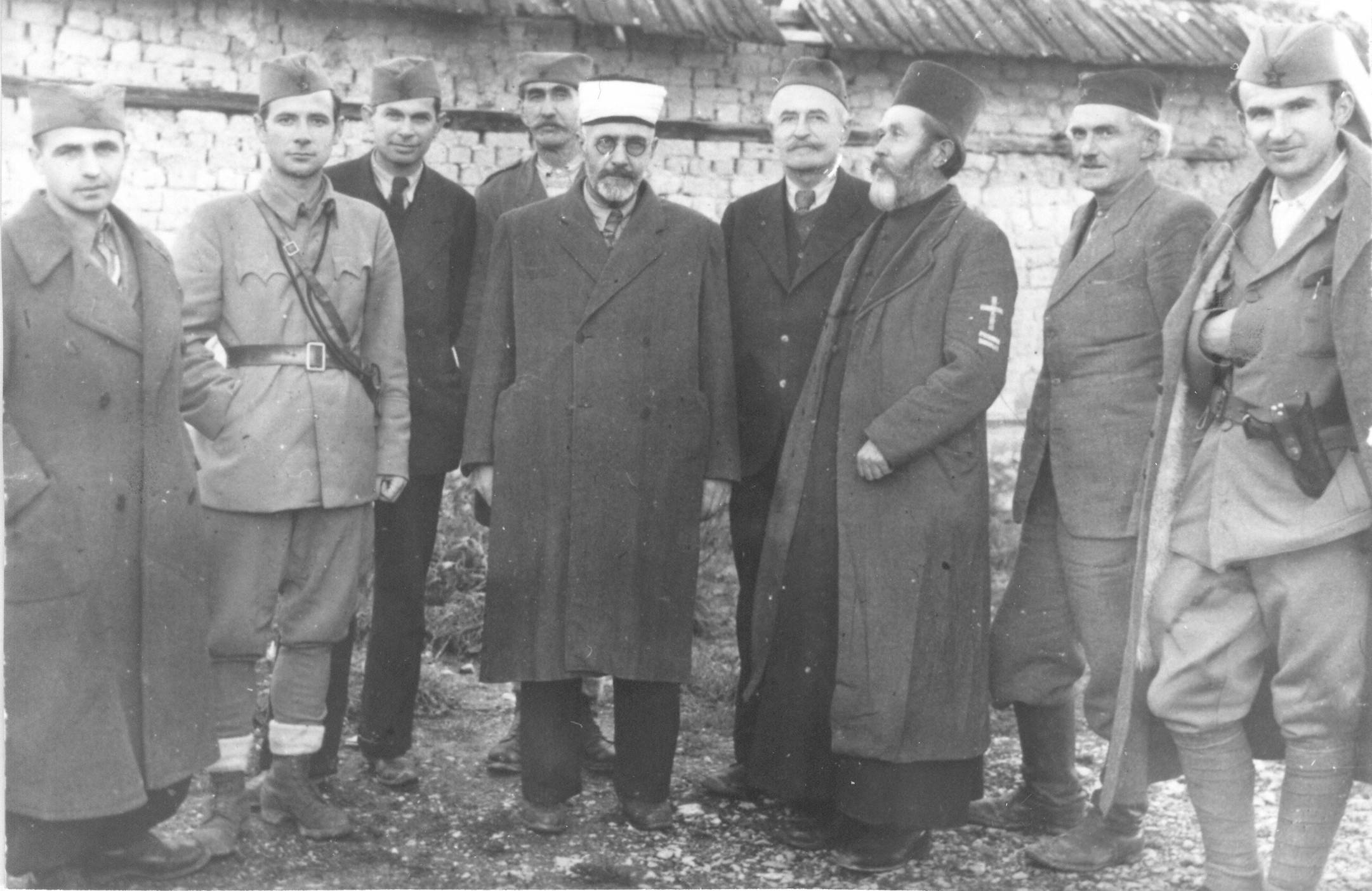 Srpskohrvatski / српскохрватски: Članovi izvršnog odbora ZAVNO i Glavnog štaba Sandžaka 20. novembra 1943 godine u Pljevljima. S desna na levo: Mišo Pavićević, Prota Jevstatije Karamatijević, Sreten Vukesavljević, Šećeragić, Dušan Ivović, Jakša Bogdanović, Predrag Vlasonić, Edib Hasanagić.